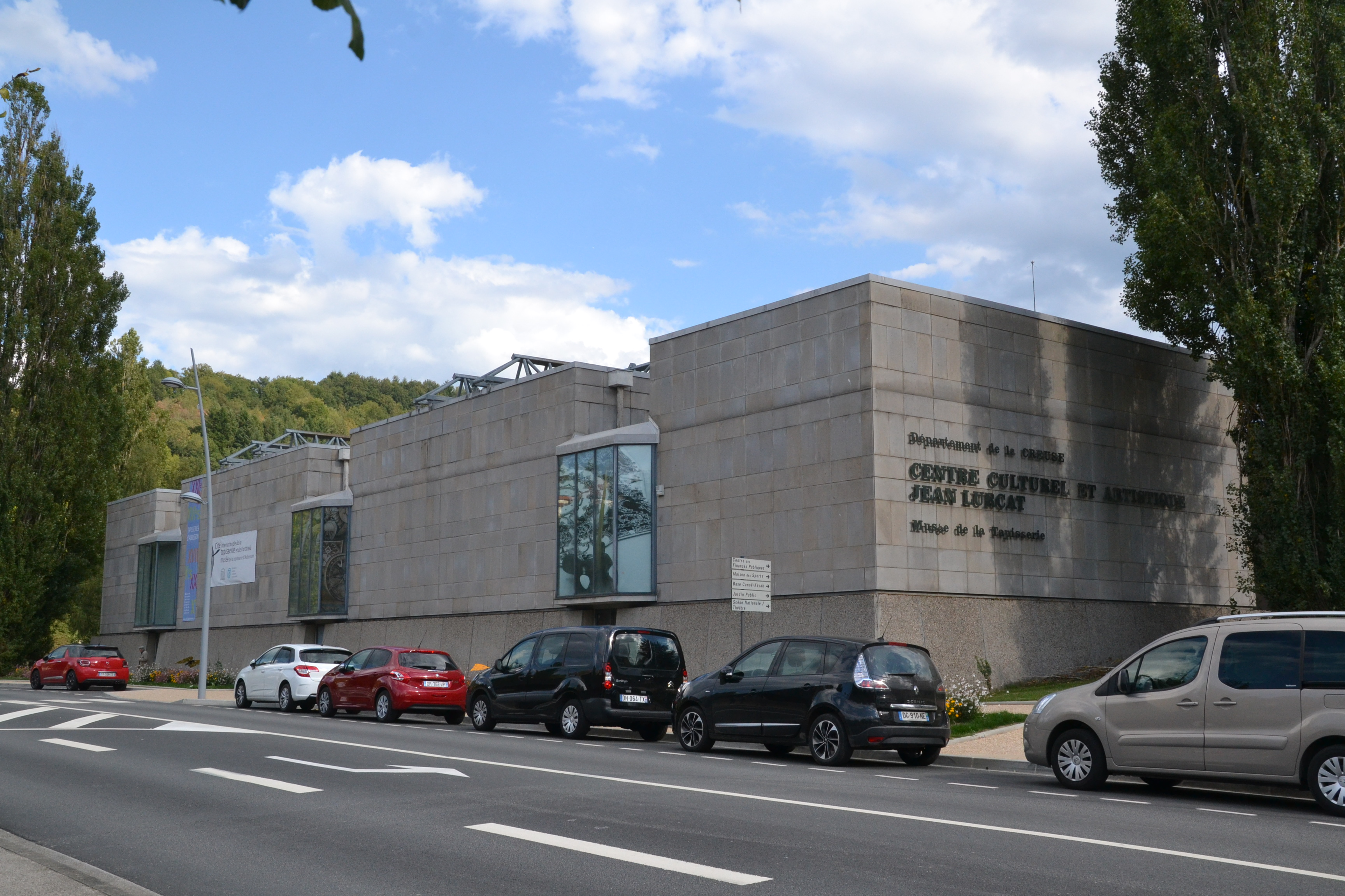 Centre culturel et musée de la tapisserie d'Aubusson (Creuse, France).